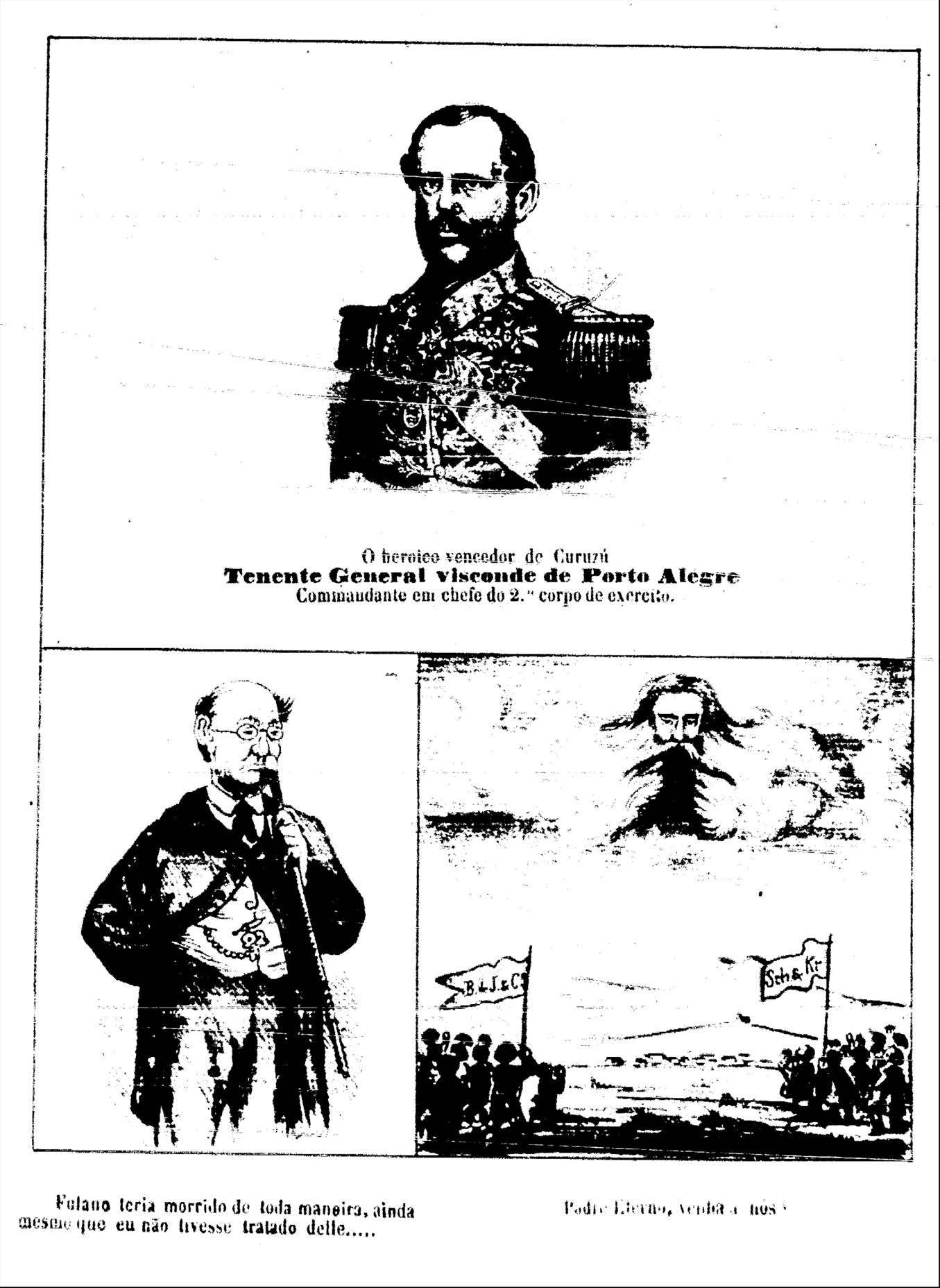 A Sentinella do Sul